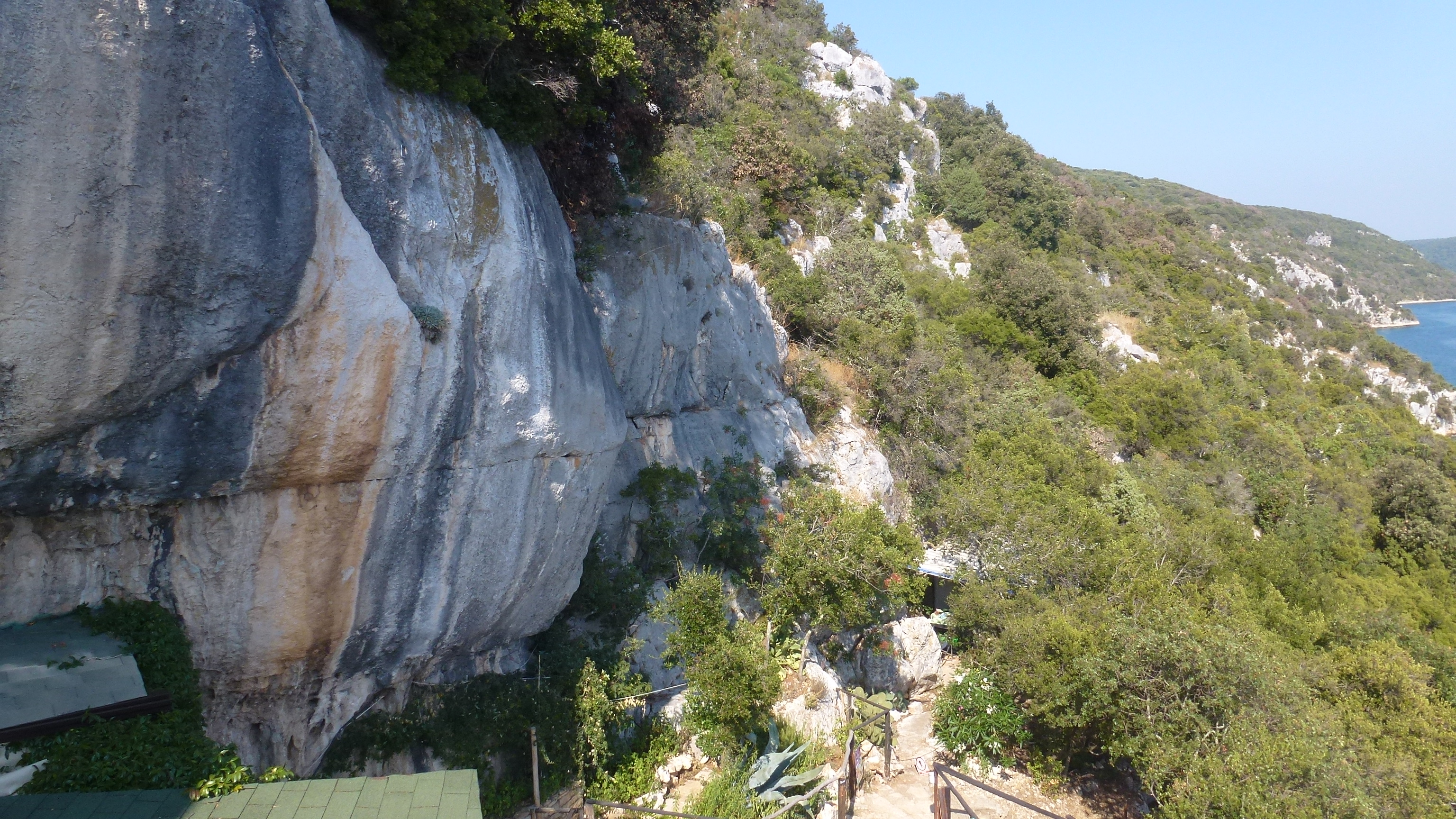 52450, Kloštar, Croatia